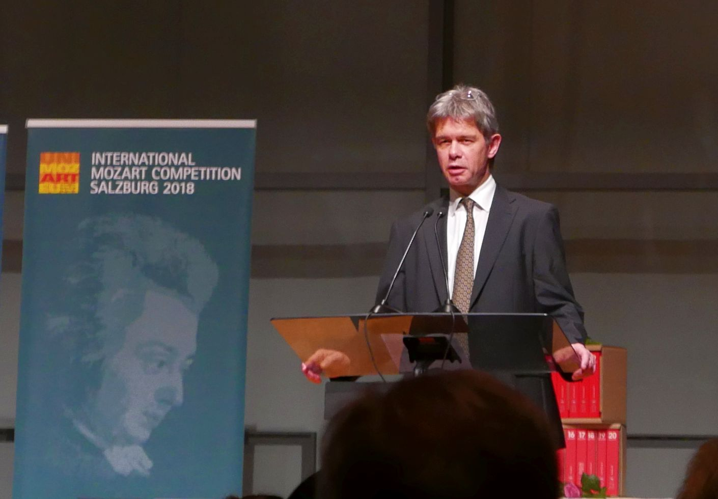 Internationaler Mozartwettbewerb 2018 Streichquartett Preisverleihung: Laudatio Lukas Hagen (Jury-Vorsitzender)